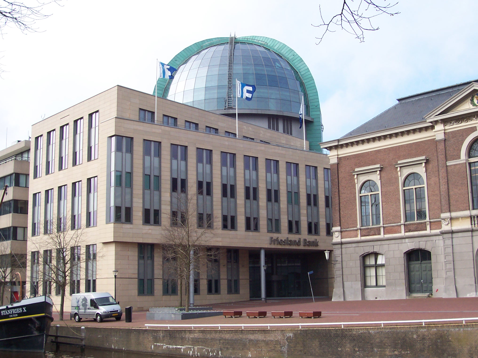 Leeuwarden, Hauptsitz der Friesland Bank